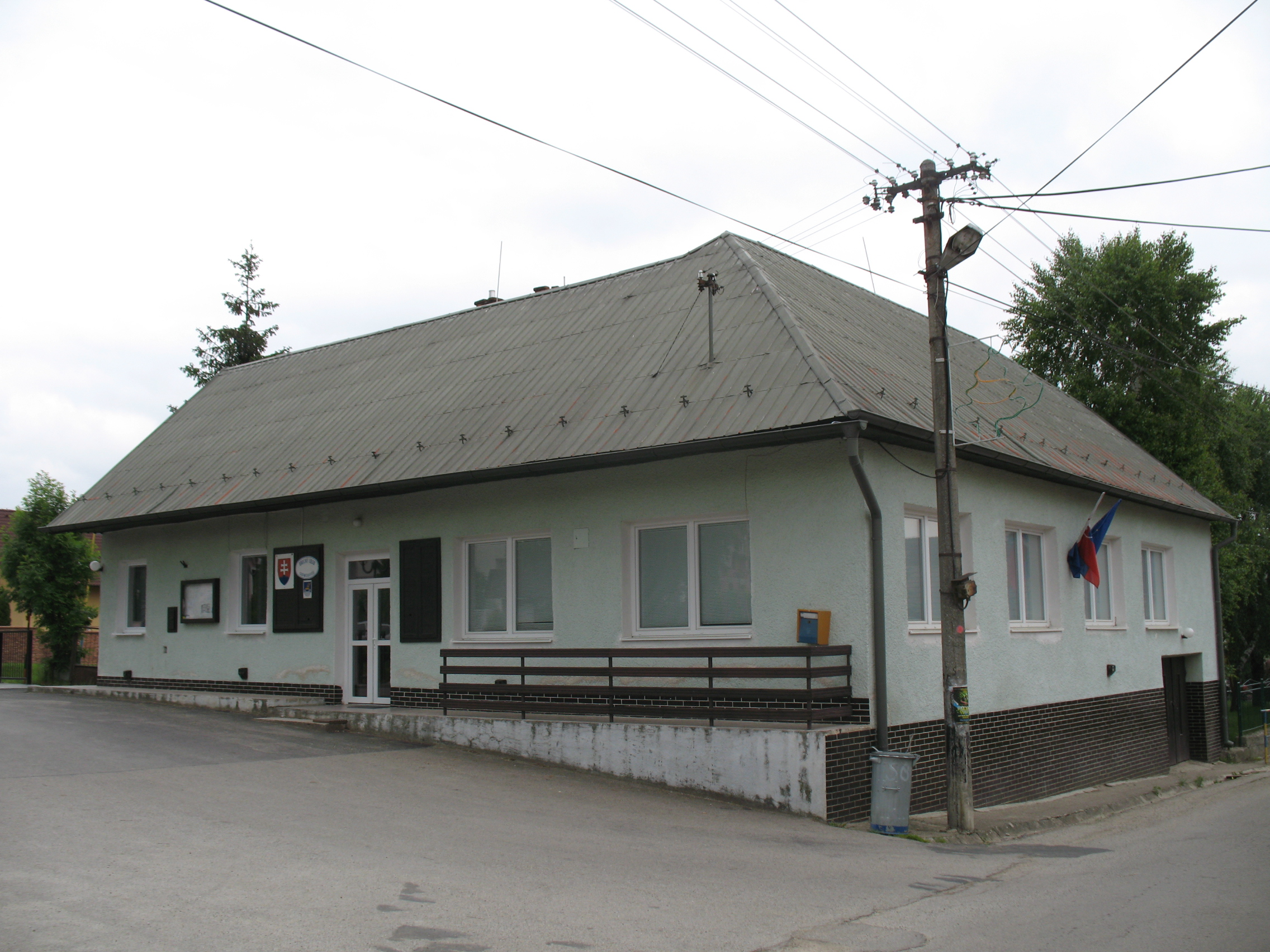 Szedmerőc